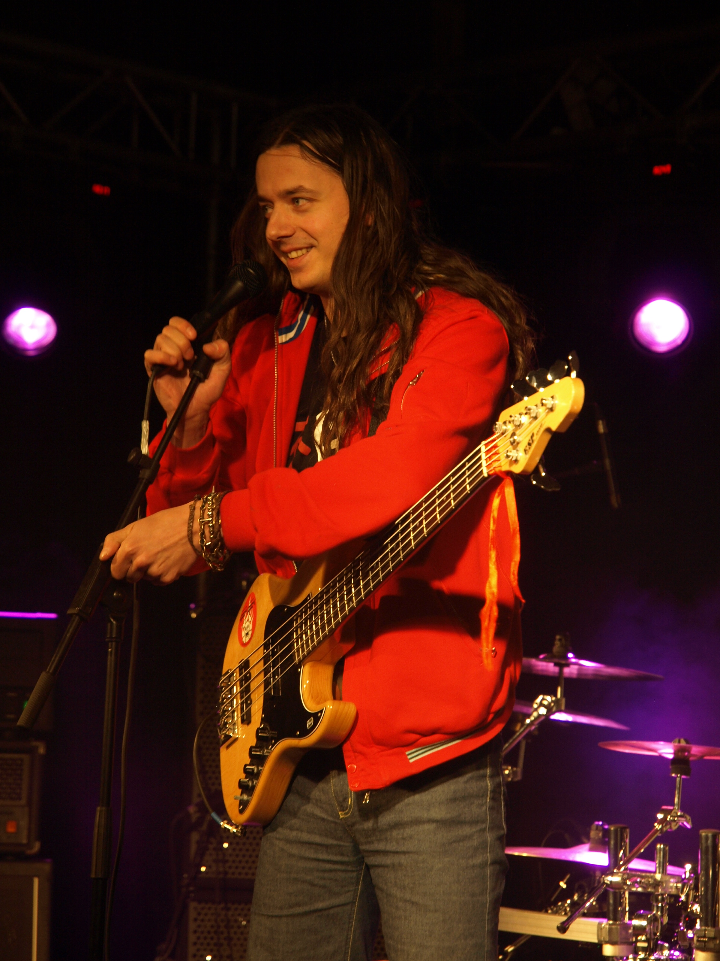 Lauri Porra at Helsinki Metal Meeting 2010